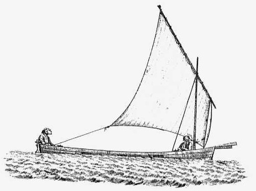 Прорезь